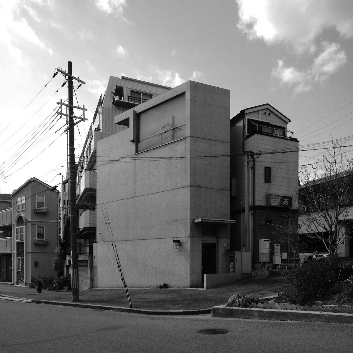 ギャラリー野田1993年 GalleryNODA